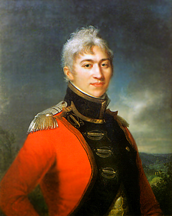 on anonymous painting (??)